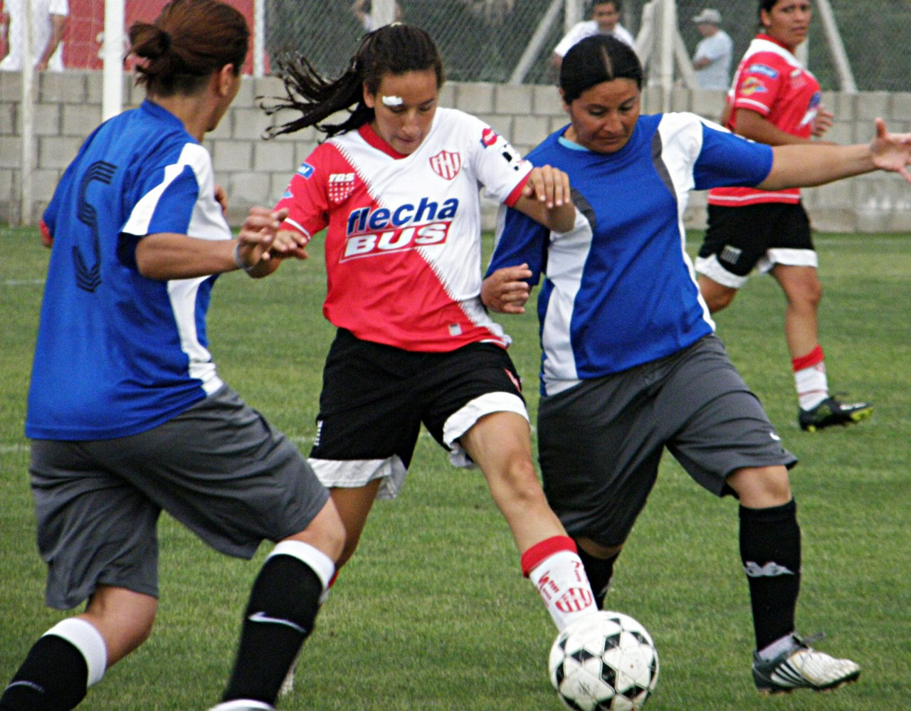 Fútbol Femenino Club Atlético Unión de Santa Fe